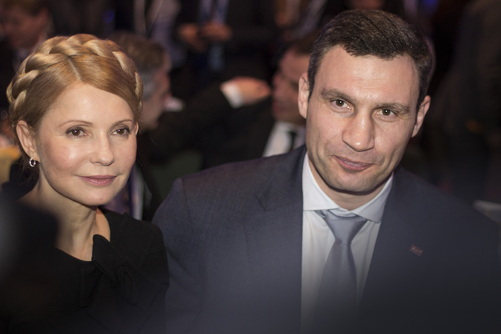 Kongres EPP, Dublin (6-7.03.2014)